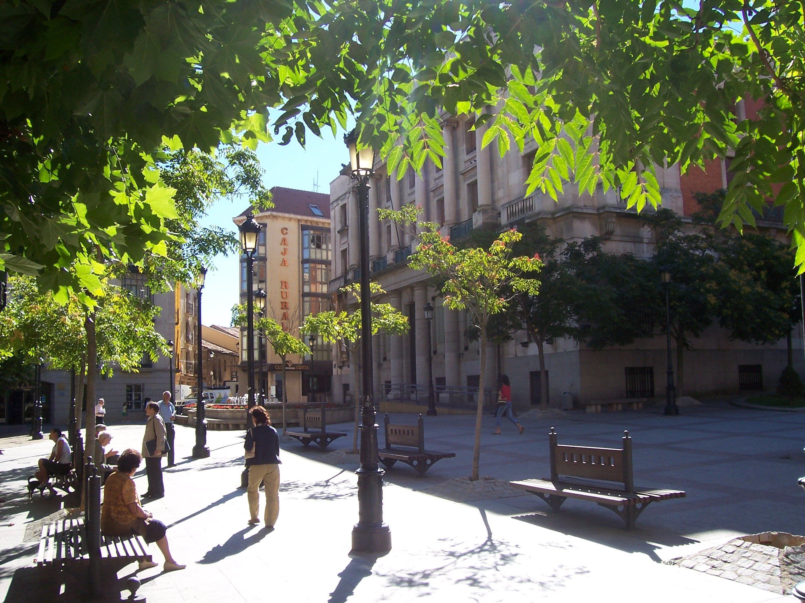 Plaza de San Esteban (Soria)